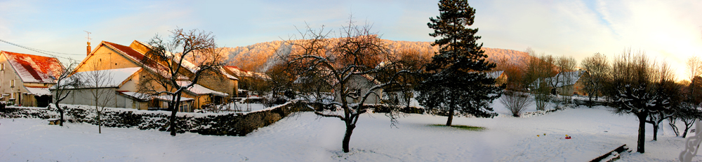 Panoramique de Bonnefontaine, Jura, le 30 décembre 2004.